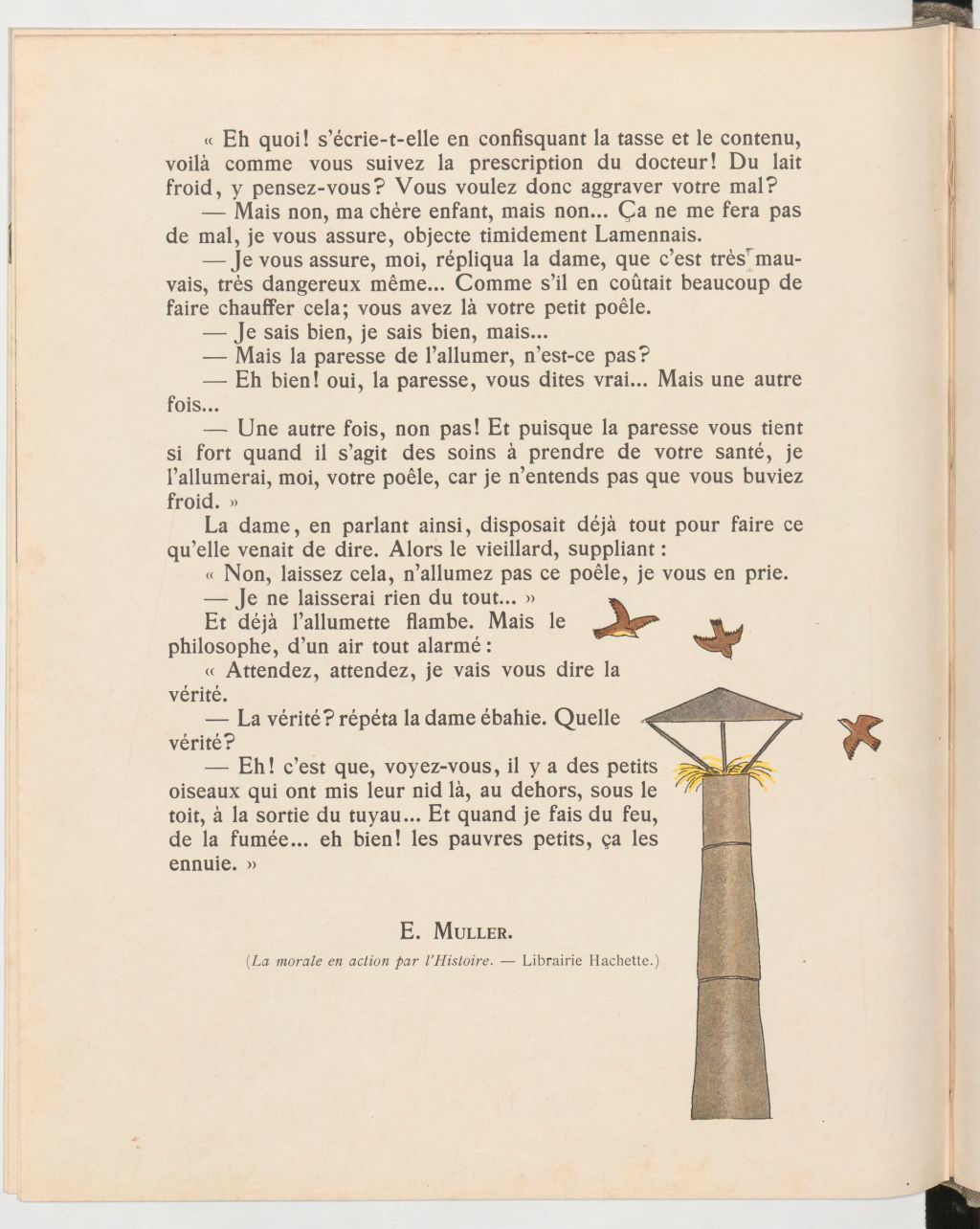 Contes et images, illustrations Marie-Madeleine Franc-Nohain : Le poêle du prisonnier, Eugène Muller, La morale en action, 1881.